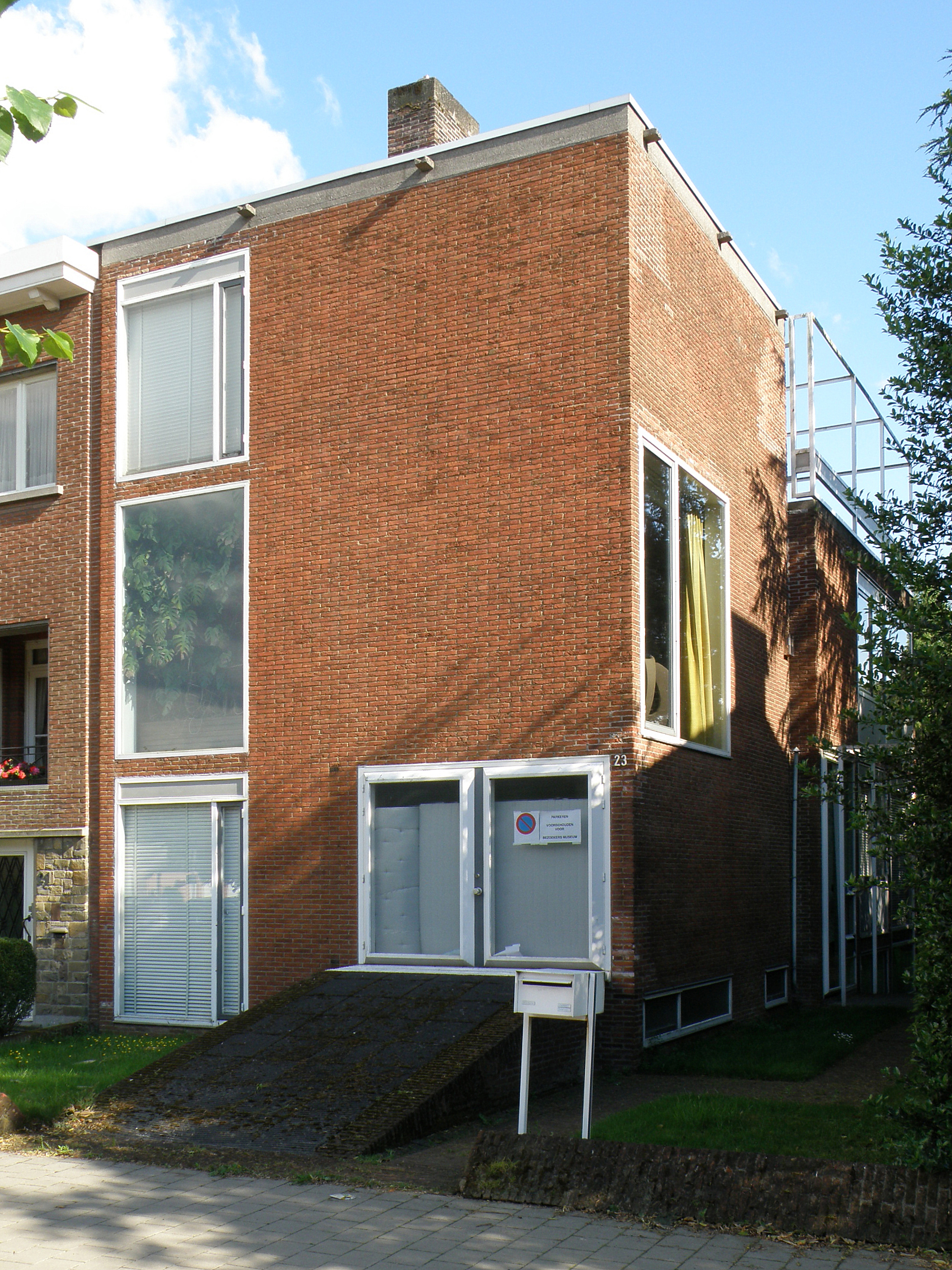 Antwerpen, district Deurne, Menegemlei n°23. Eigen woonhuis Renaat Braem, naar eigen ontwerp, anno 1950.